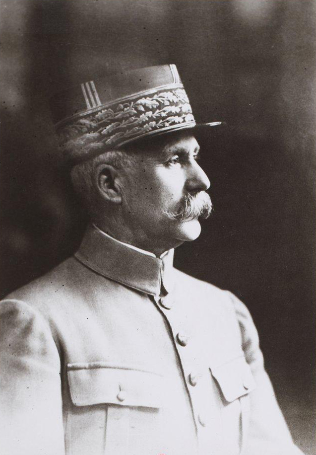 Portrait du maréchal Pétain issu du recueil Portraits de Philippe Pétain (page 3).